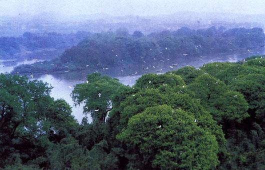 位于常宁市